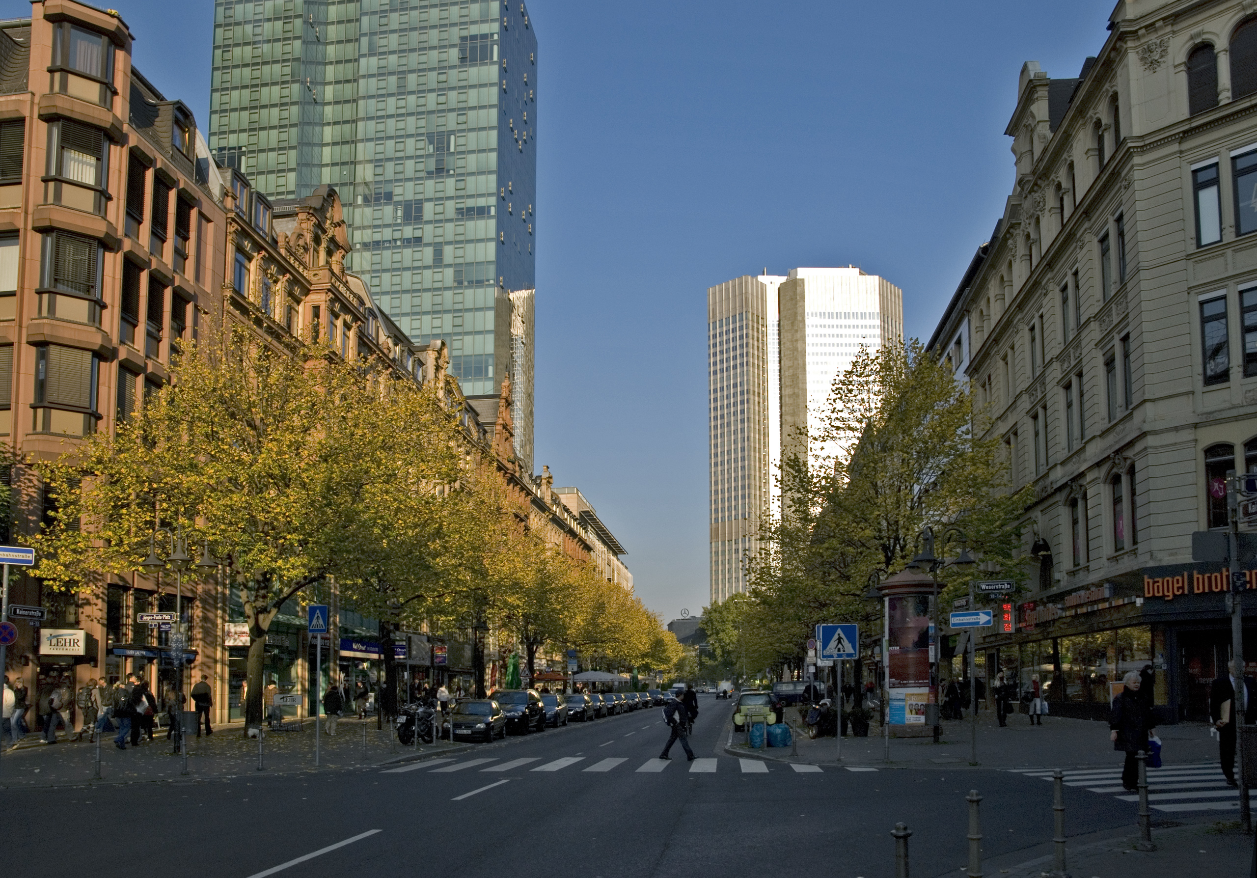 Kaiserstraße Frankfurt, Ecke Weserstraße